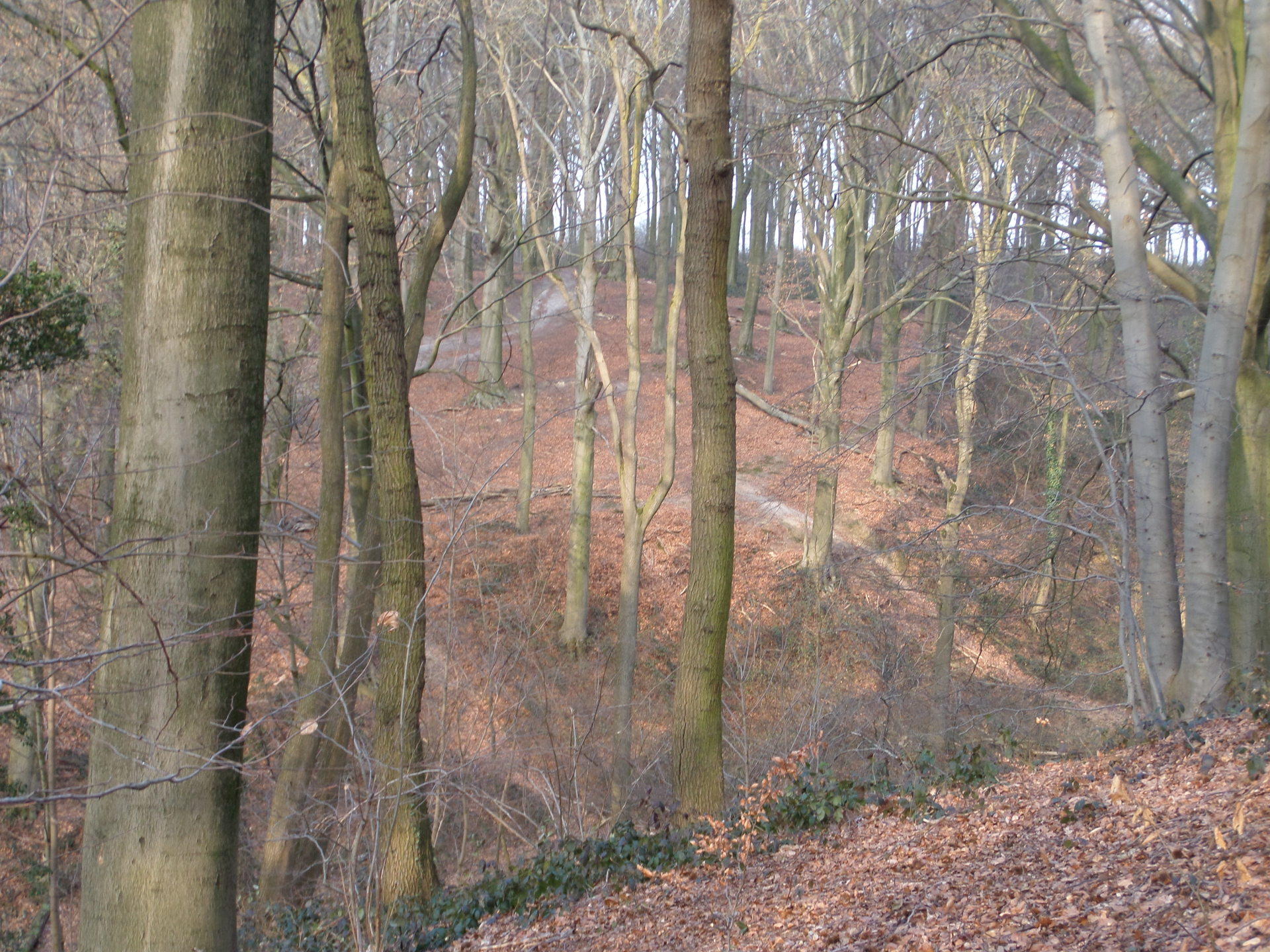 Hellingen in het Stammenderbos (gemeente Schinnen)